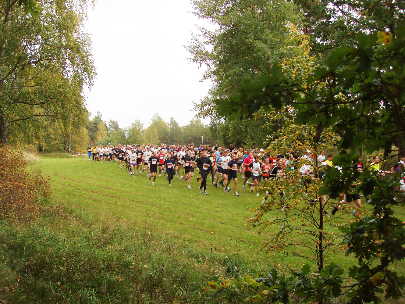 Lidingöloppet 27 september 2008. Grupp 2, 30 km några minuter efter start kl. 12:40. Vy från Stockby motionsgård österut.